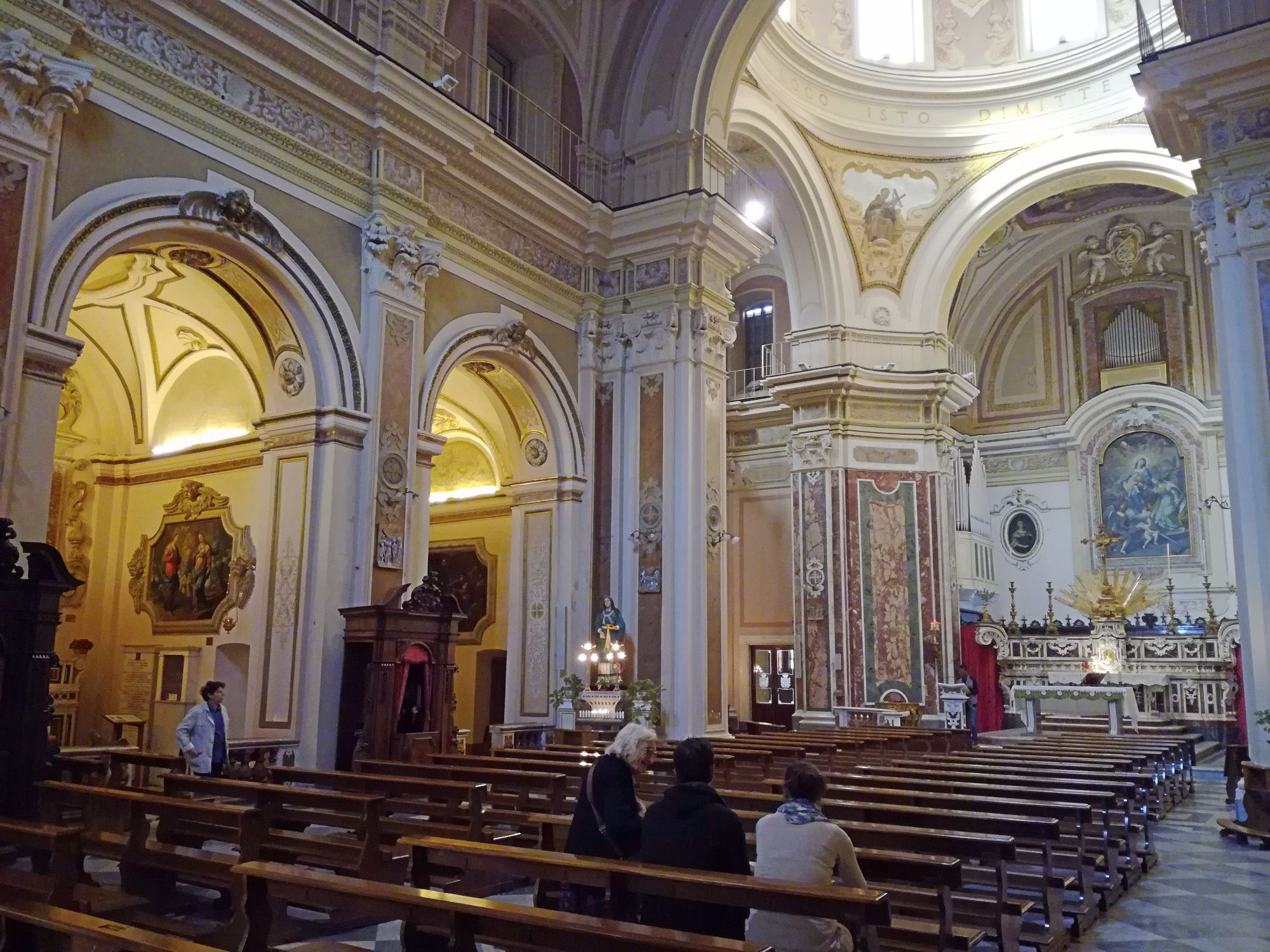 Interno, Santa Caterina a Chiaia, Napoli